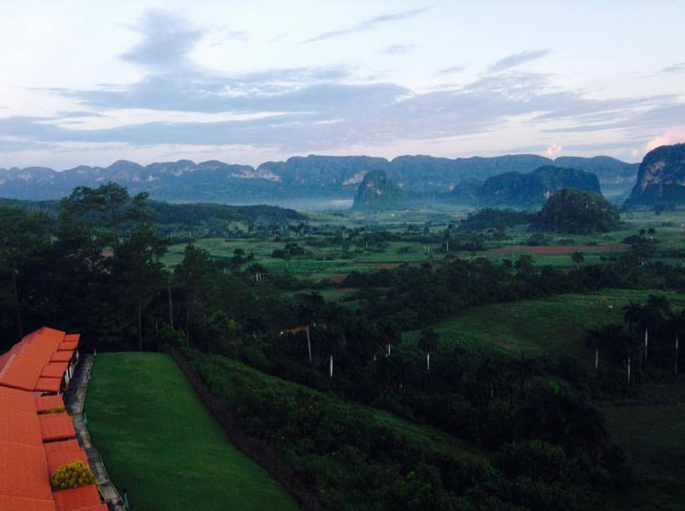 Спасибо девочкам из Just Go за волшебный отдых на Кубе